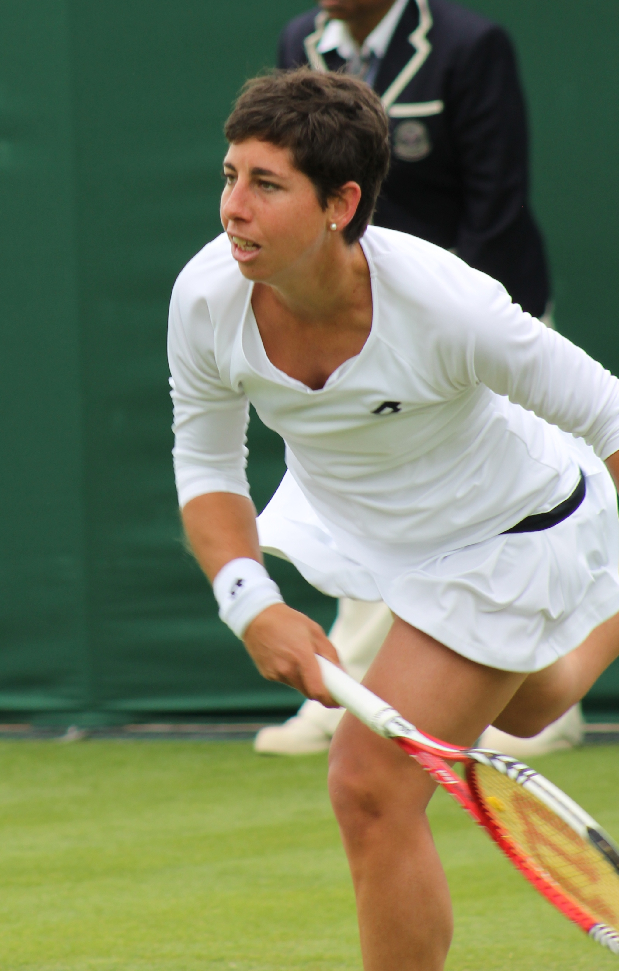 Carla Suárez Navarro at 2013 Wimbledon